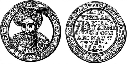 Rumantsch: Medalia lui MIhai Viteazul